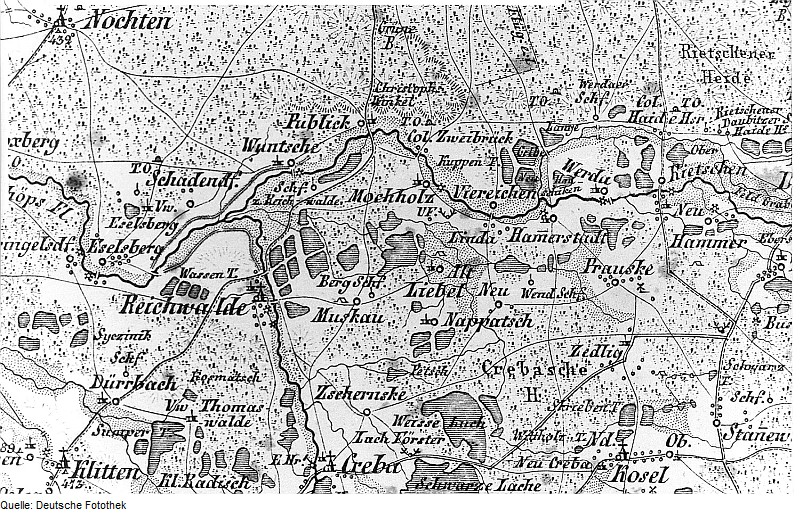 Original image description from the Deutsche Fotothek Rietschen-Viereichen-Mocholz. Atlas von Schlesien, Kreis Rothenburg, Verlag C. Flemming/Glogau, um 1850